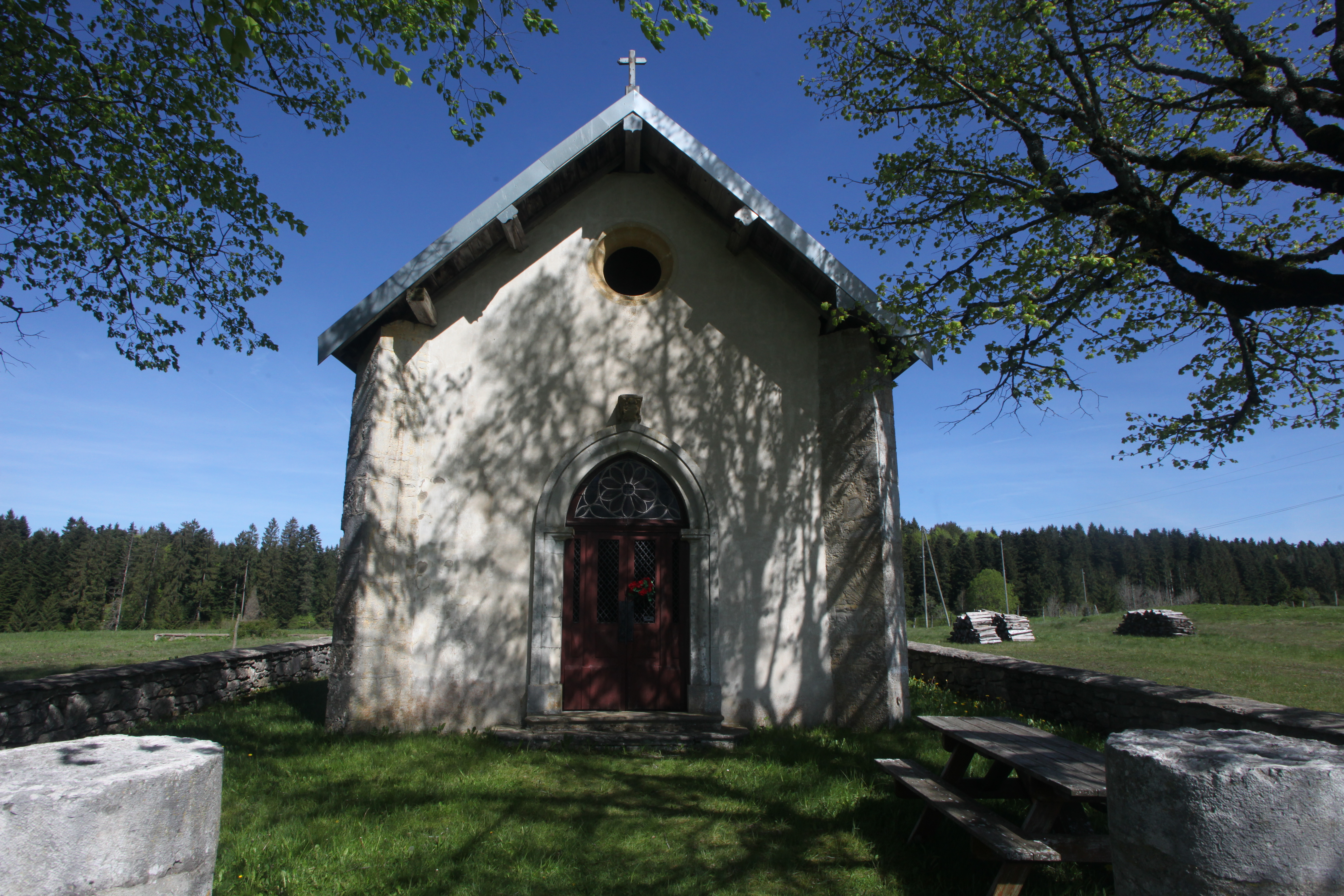 Chapelle Notre-Dame des Champs à Boujailles (Doubs).